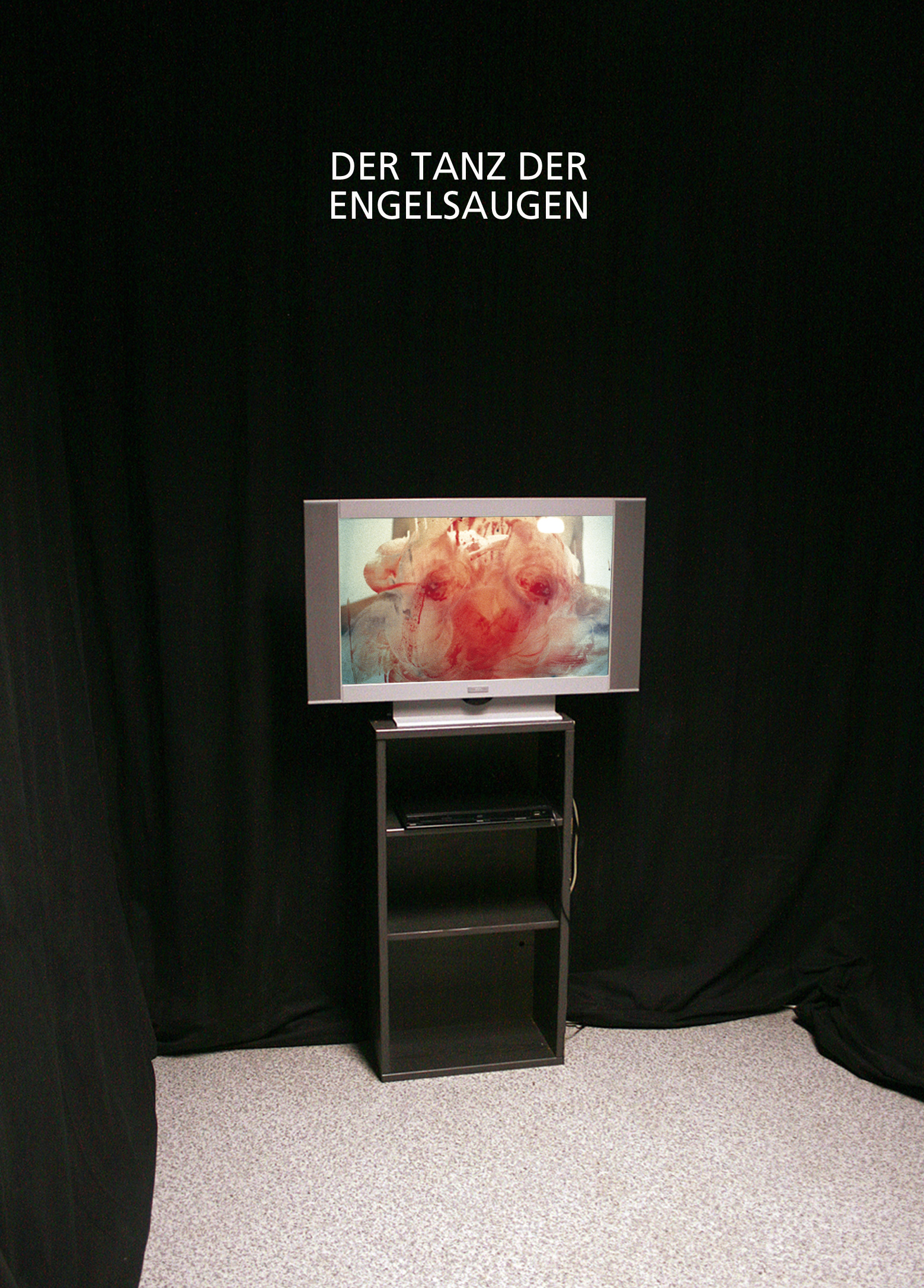 2015 - Videoinstallation im Seelsorgeraum der ehemaligen JVA Suderstadt, Fotografie mit Videostill von Dieter Gerschler